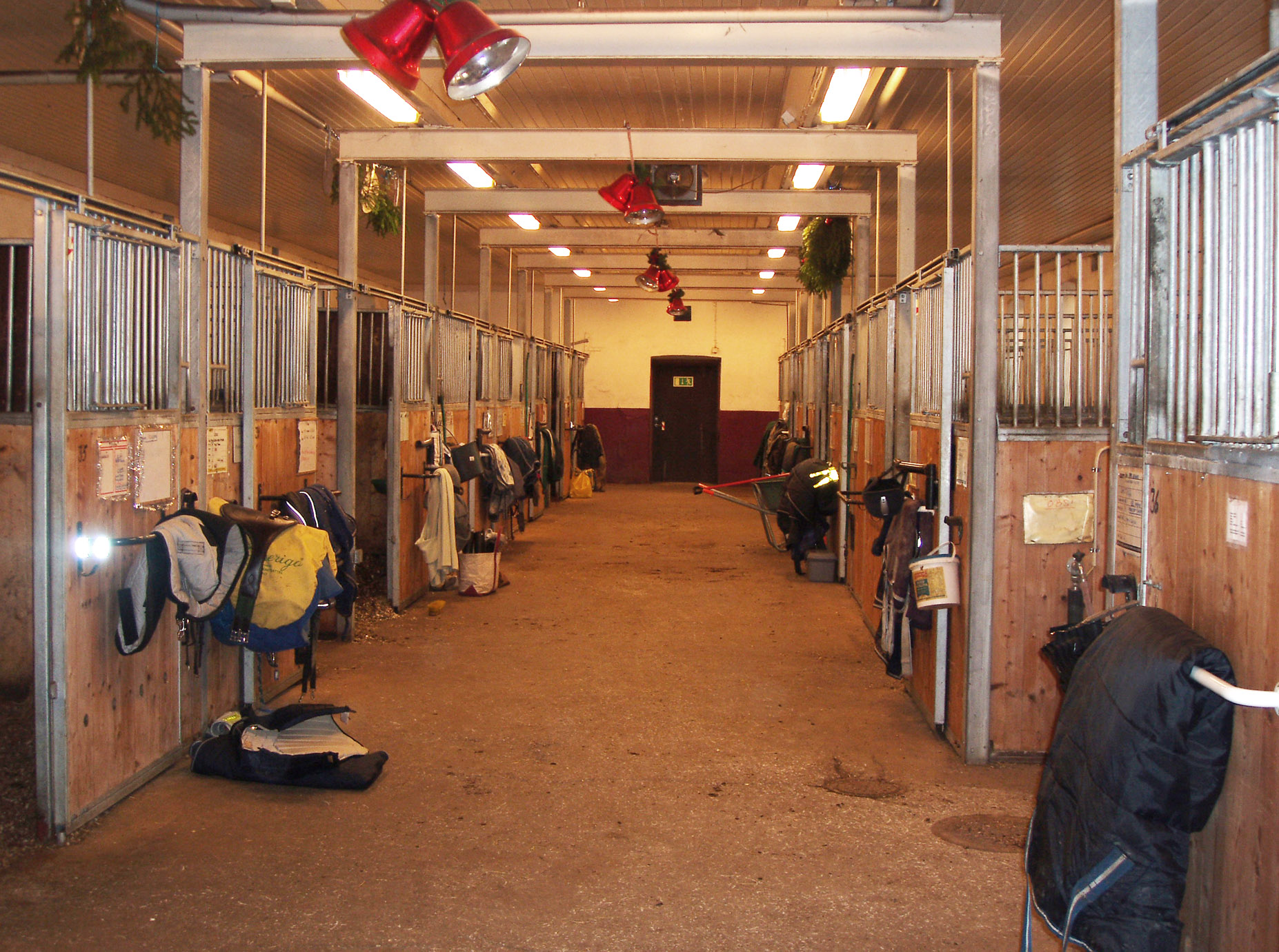 Interiör från Elfviks gårds stora ladugårds häststall med 19 boxar som hyrs ut till privatägda hästar.